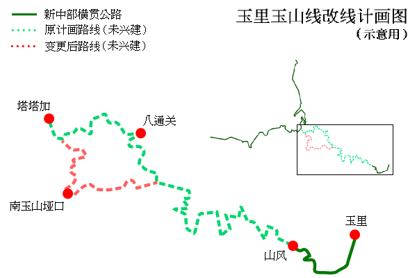 玉里玉山线改线示意图。